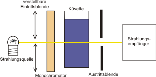 Photometrische Messung: schematische Darstellung